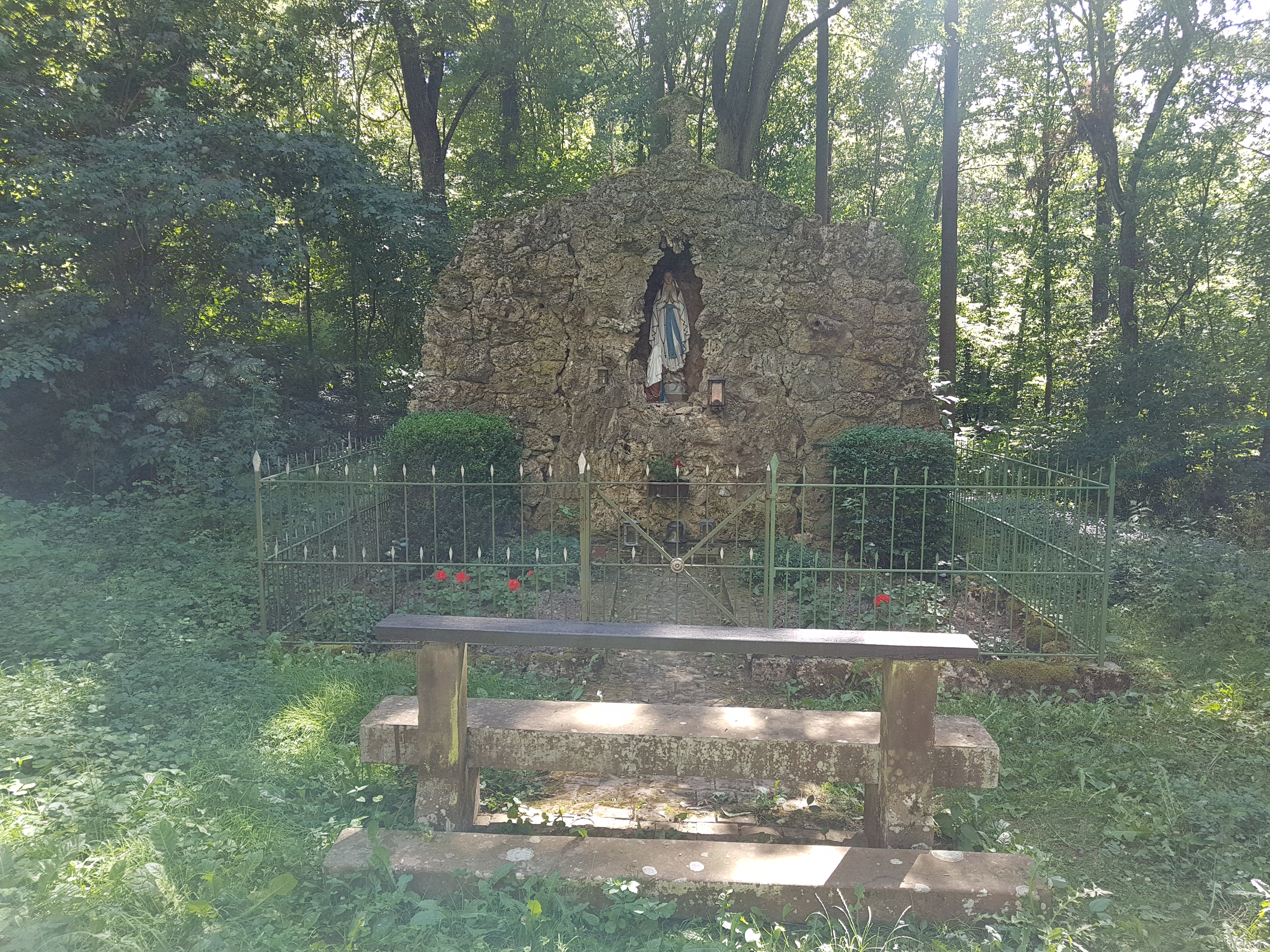 In den 1790er Jahren wurde eine Mariengrotte (auch Lourdes-Grotte genannt), die sich 60 Schritte hinter der Dittwarer Kreuzkapelle befindet, erbaut und bald darauf vergrößert. Sie besteht aus Travertinbrocken von der Dittwarer Gemarkung Heidenkessel.